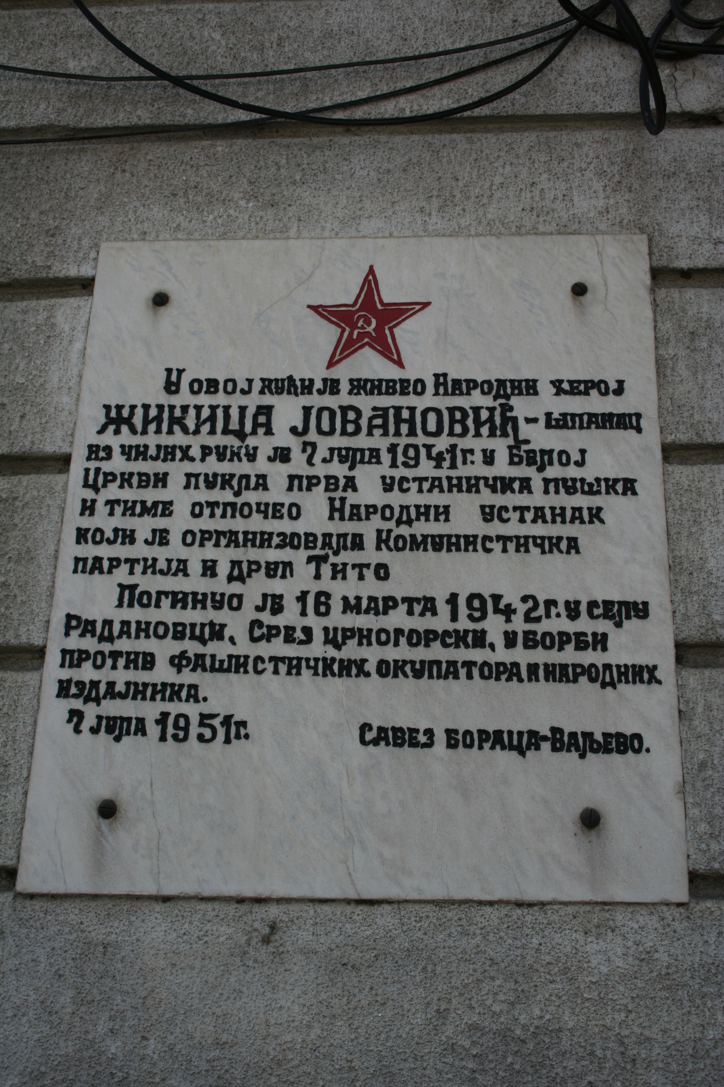 Kuća Milana Jovanovića, Valjevo